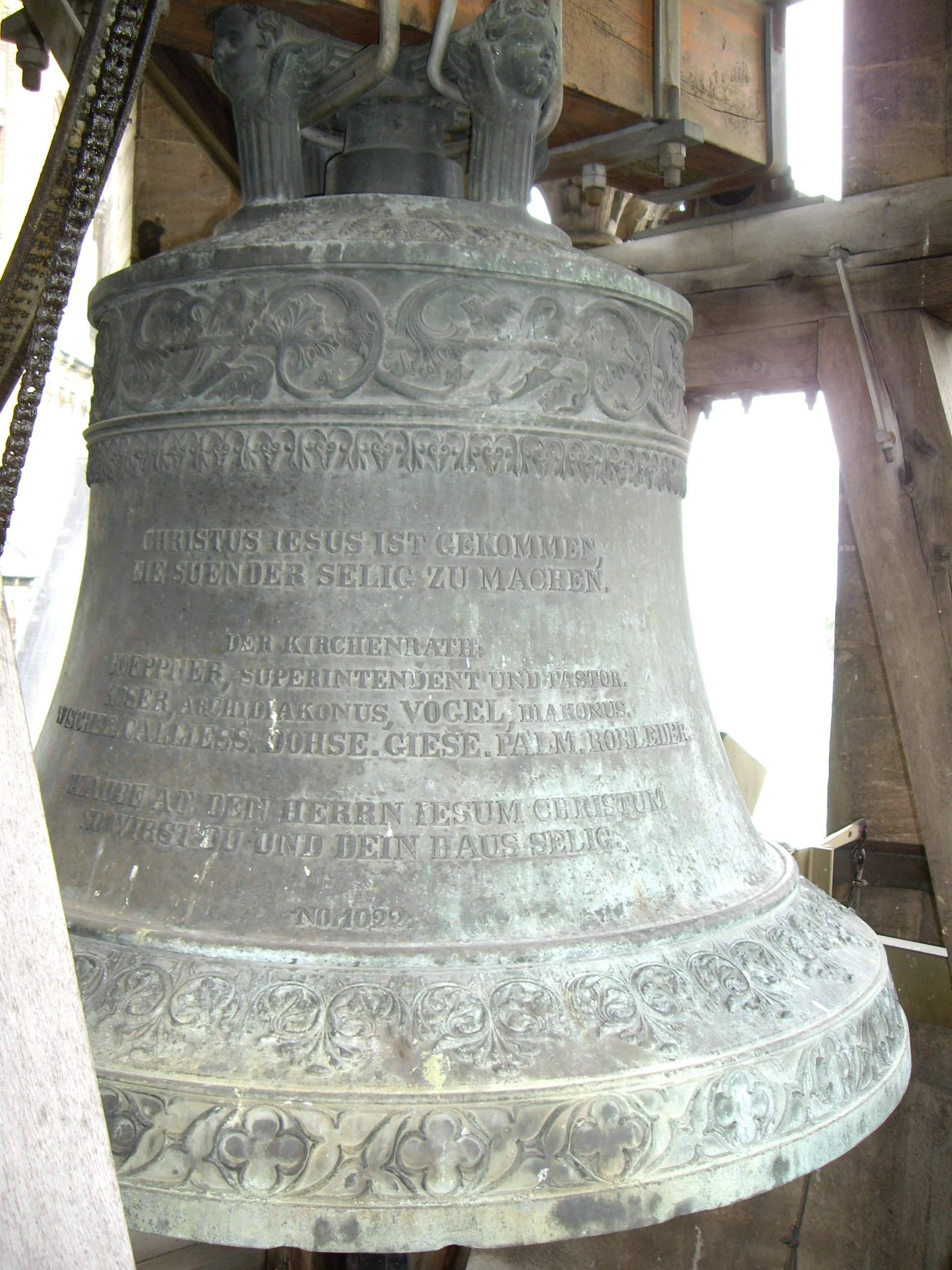 Große Glocke von St. Lukas in München. Die Glocke stammt aus der Stargarder Marienkirche.